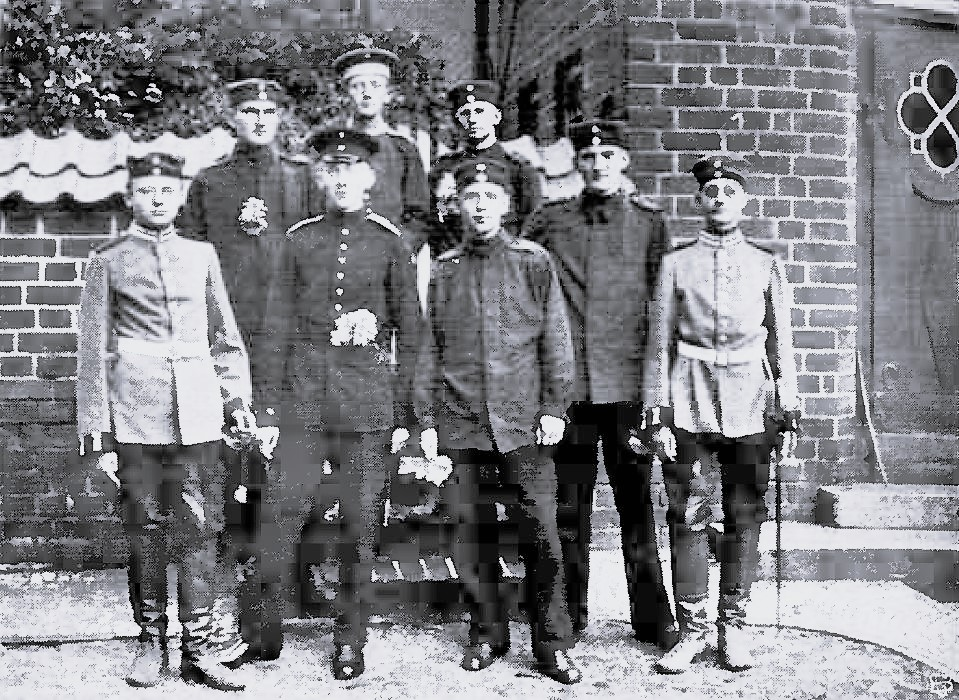 Nur ein Teil der freiwillig eingetretenen Primaner wurde auf dem obigen Bilde gebannt